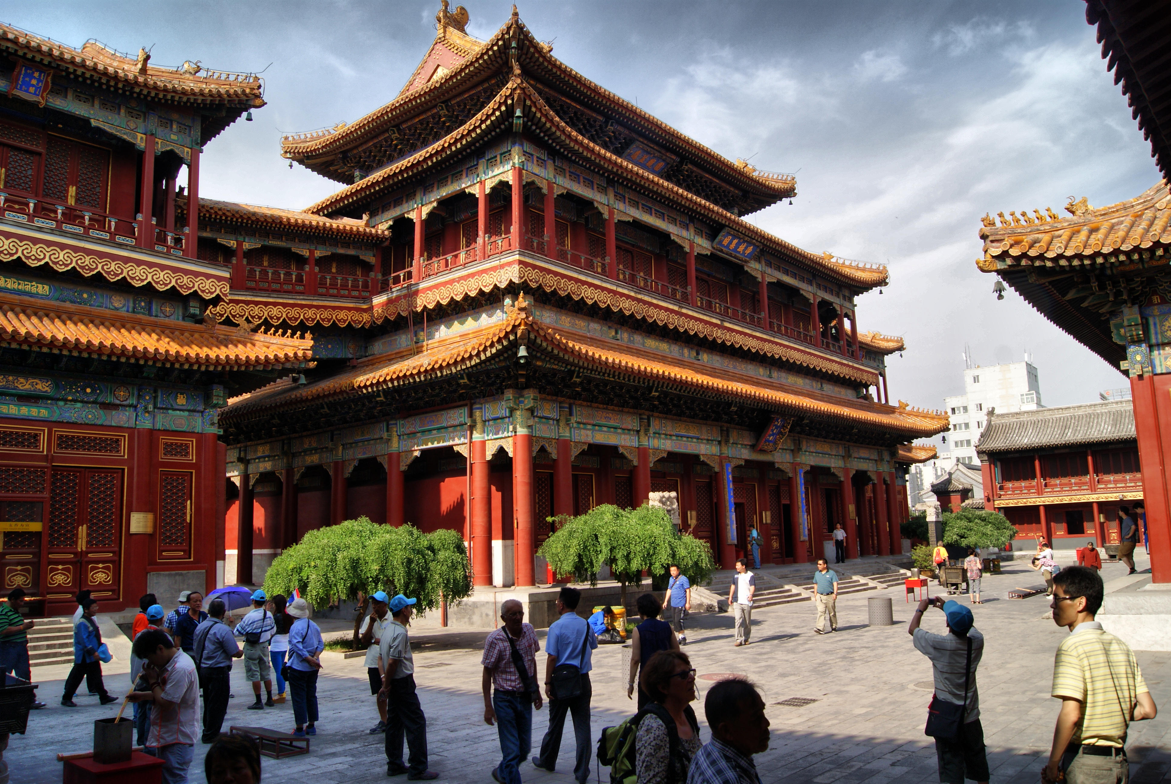 Dongcheng, Beijing, China